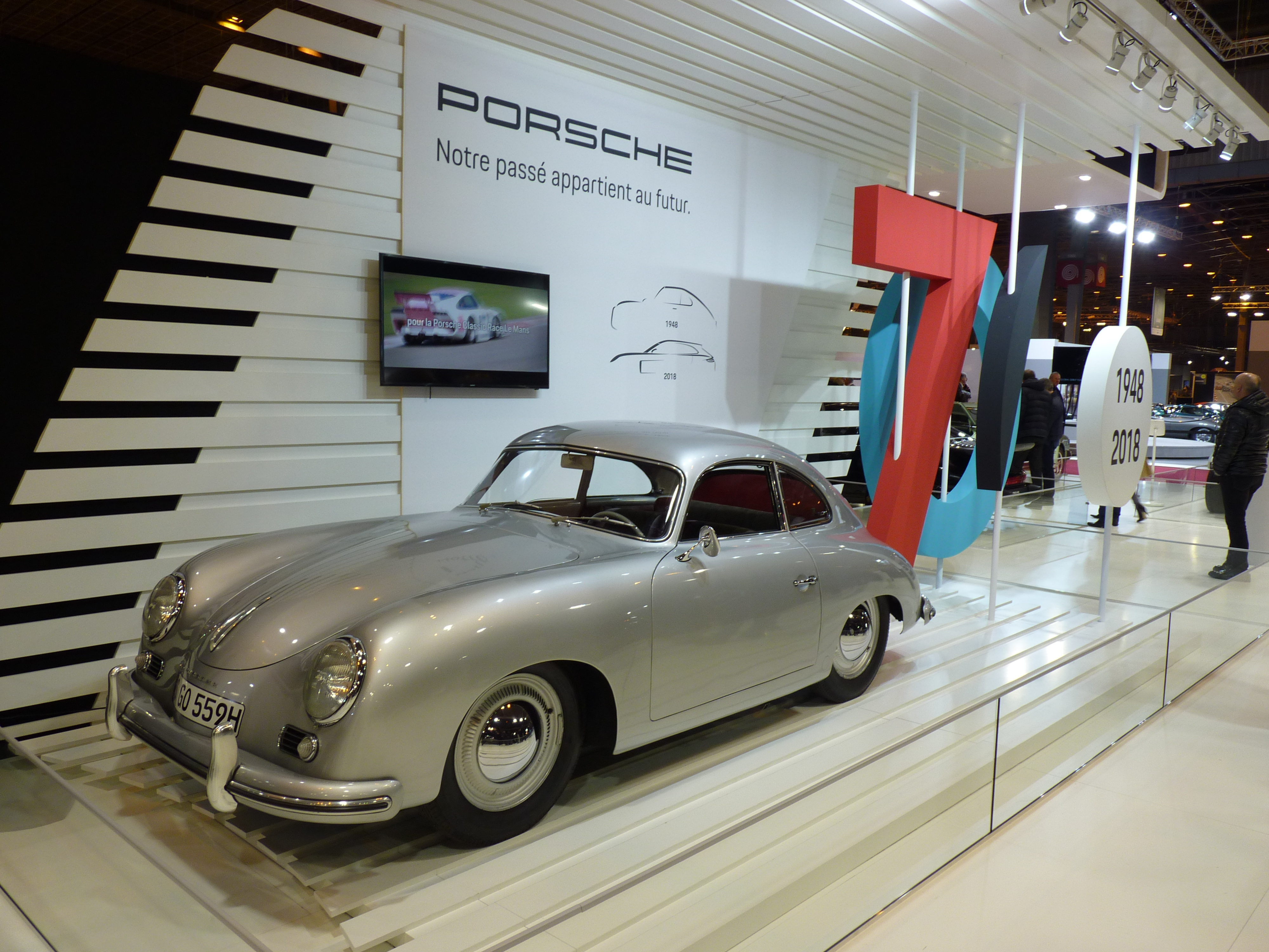 70 ans de la Porsche 356 à Rétromobile 2018